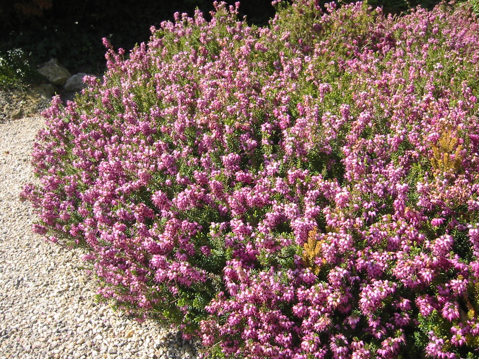 Erica herbacea; Botanic Garden, Vienna, Austria.